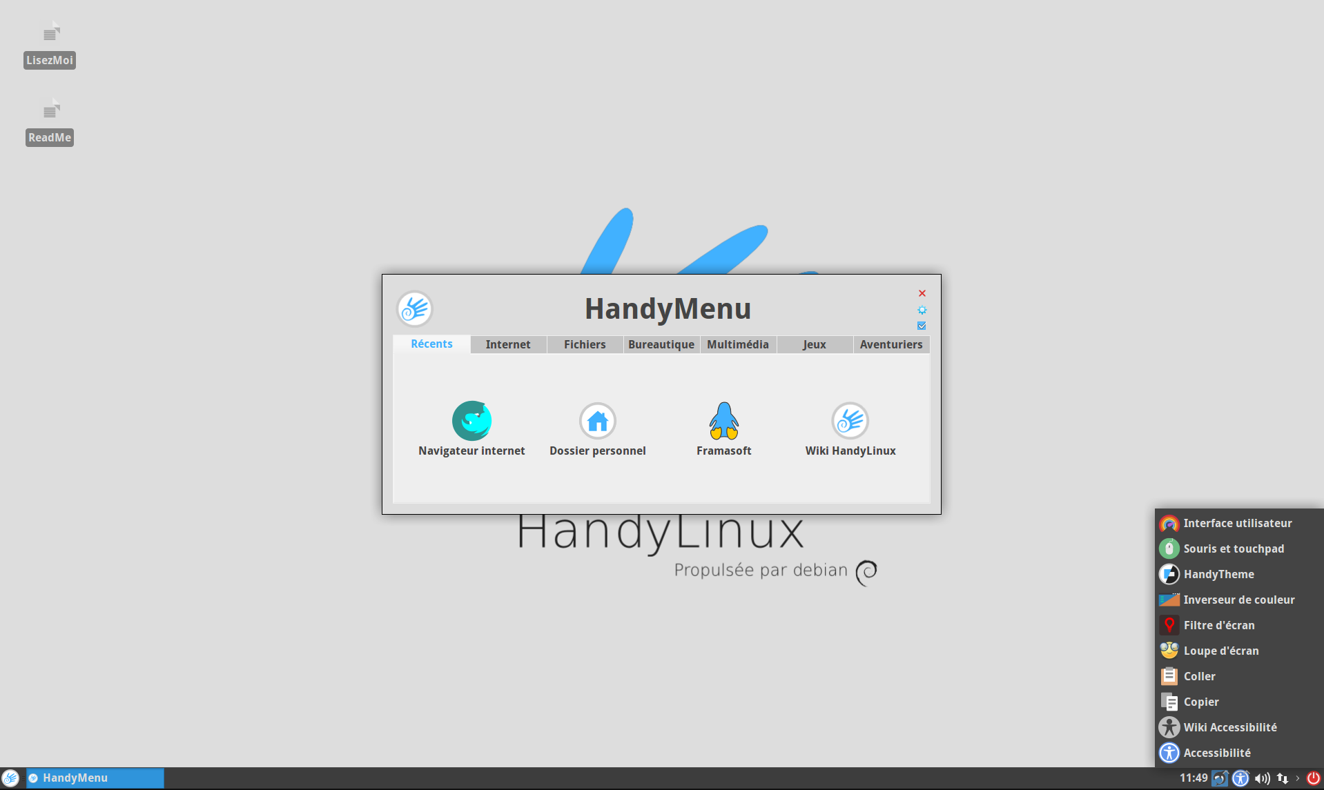 capture d'écran du bureau par défaut